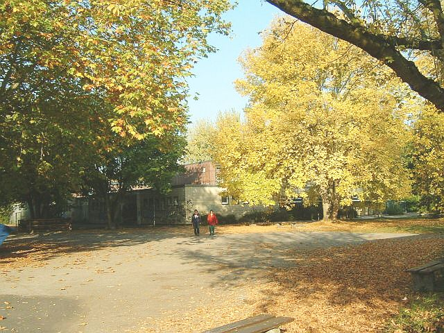 Ernst-Reuter Schule in Frankfurt Main, Artikel siehe , selbst fotografiert am 12.10.2005--Peng 09:19, 13 October 2005 (UTC)